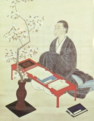 Motoori Norigano portretas, kurį jis pats nutapė.